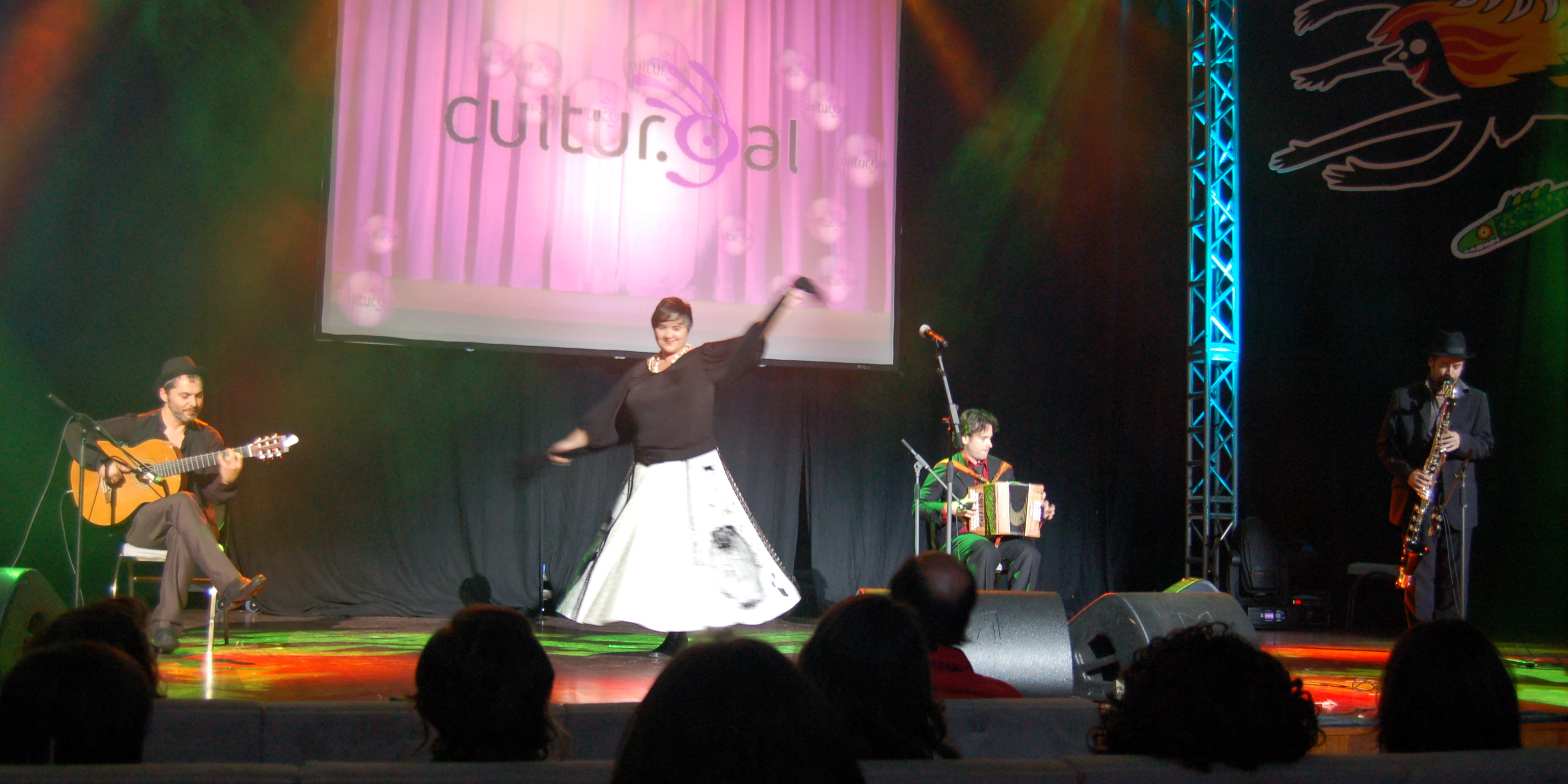 Concerto de Marful no CulturGal 2008